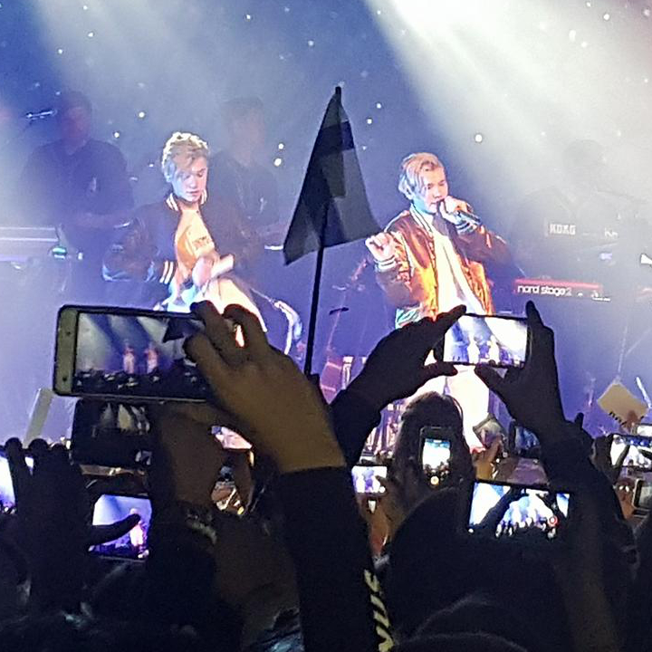 Norwescy duet Marcus & Martinus podczas koncertu w warszawskiej Stodole, marzec 2018.